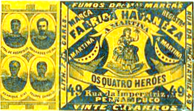 Rótulo de cigarro. Os Quatro Heróis (Vidal de Negreiros, Fernandes Vieira, Henrique Dias & Felipe Camarão).